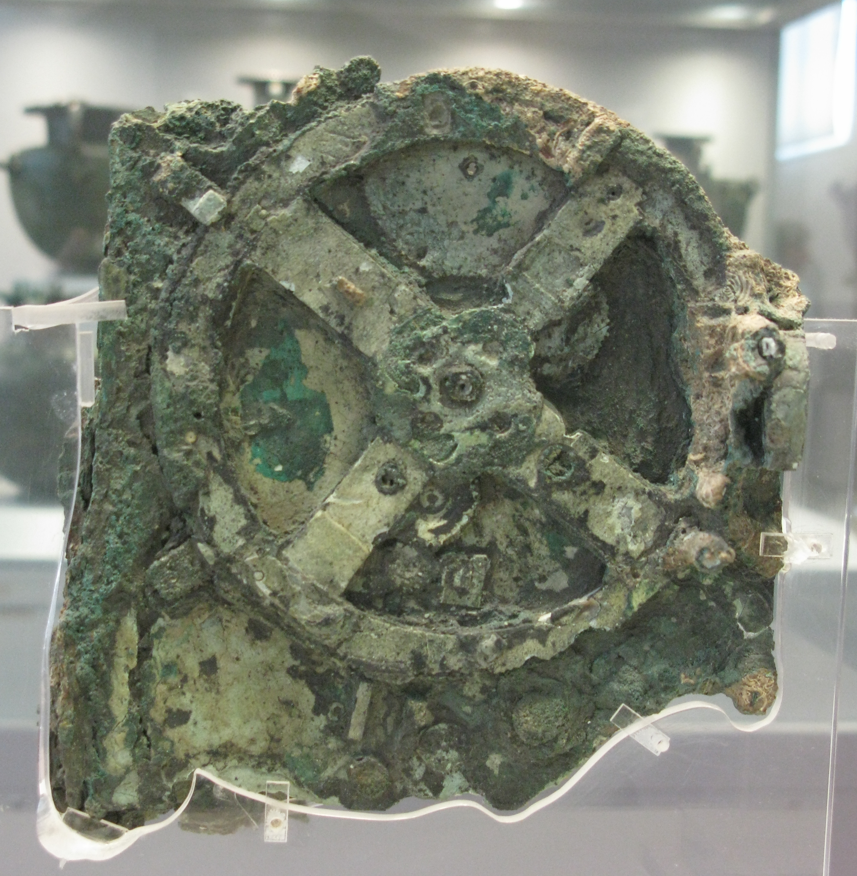 National Archaeological Museum, Athens, Greece. --- Ο Μηχανισμός των Αντικυθήρων. Εθνικό Αρχαιολογικό Μουσείο. Αθήνα.